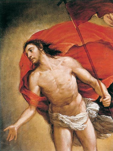 Detalle de la pintura al óleo, Cristo apareciéndose a su Madre de Juan Fernandez Navarrete "el mudo"